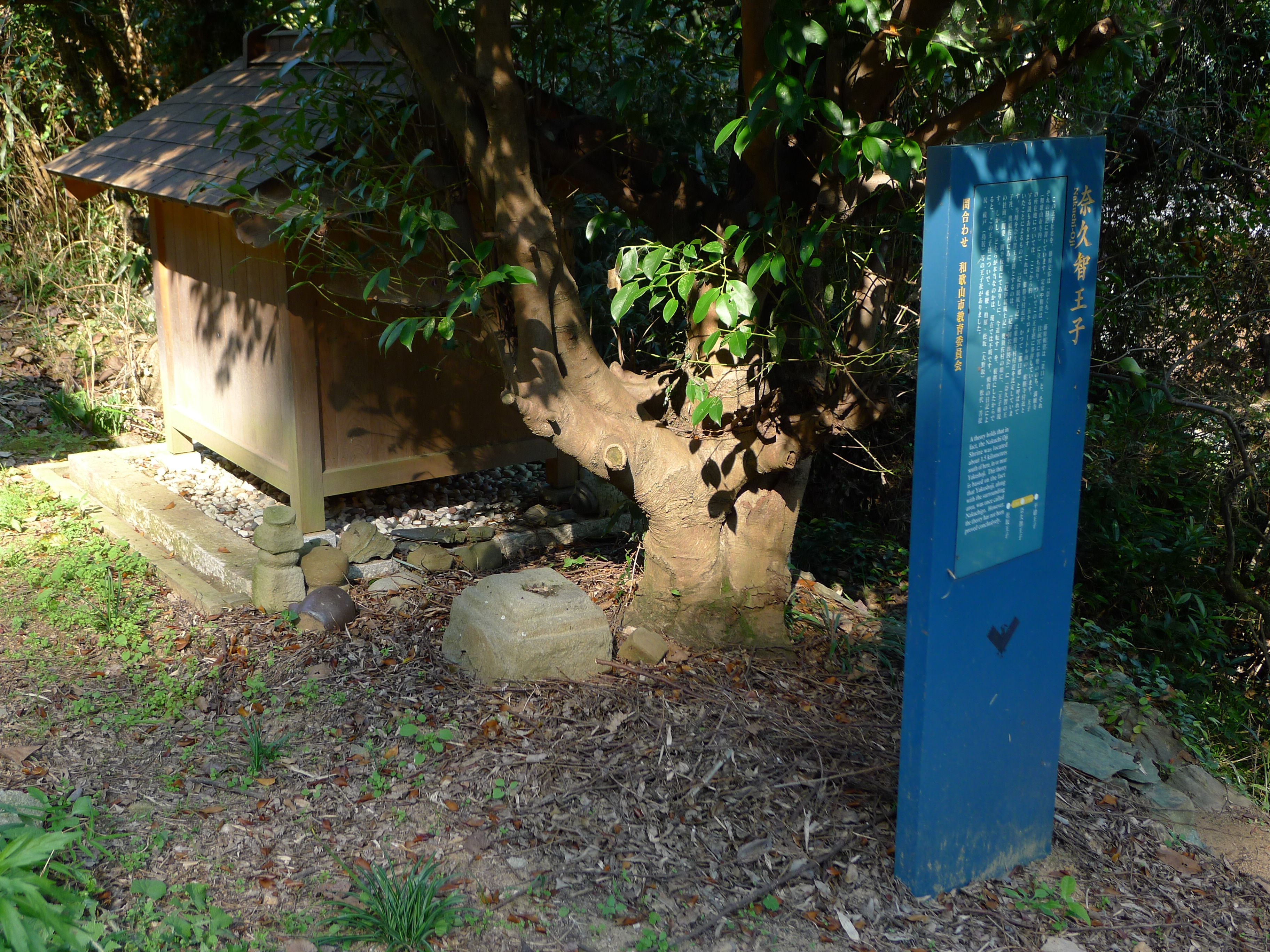 熊野古道・紀伊路の九十九王子の一つ奈久智王子（和歌山県海南市）